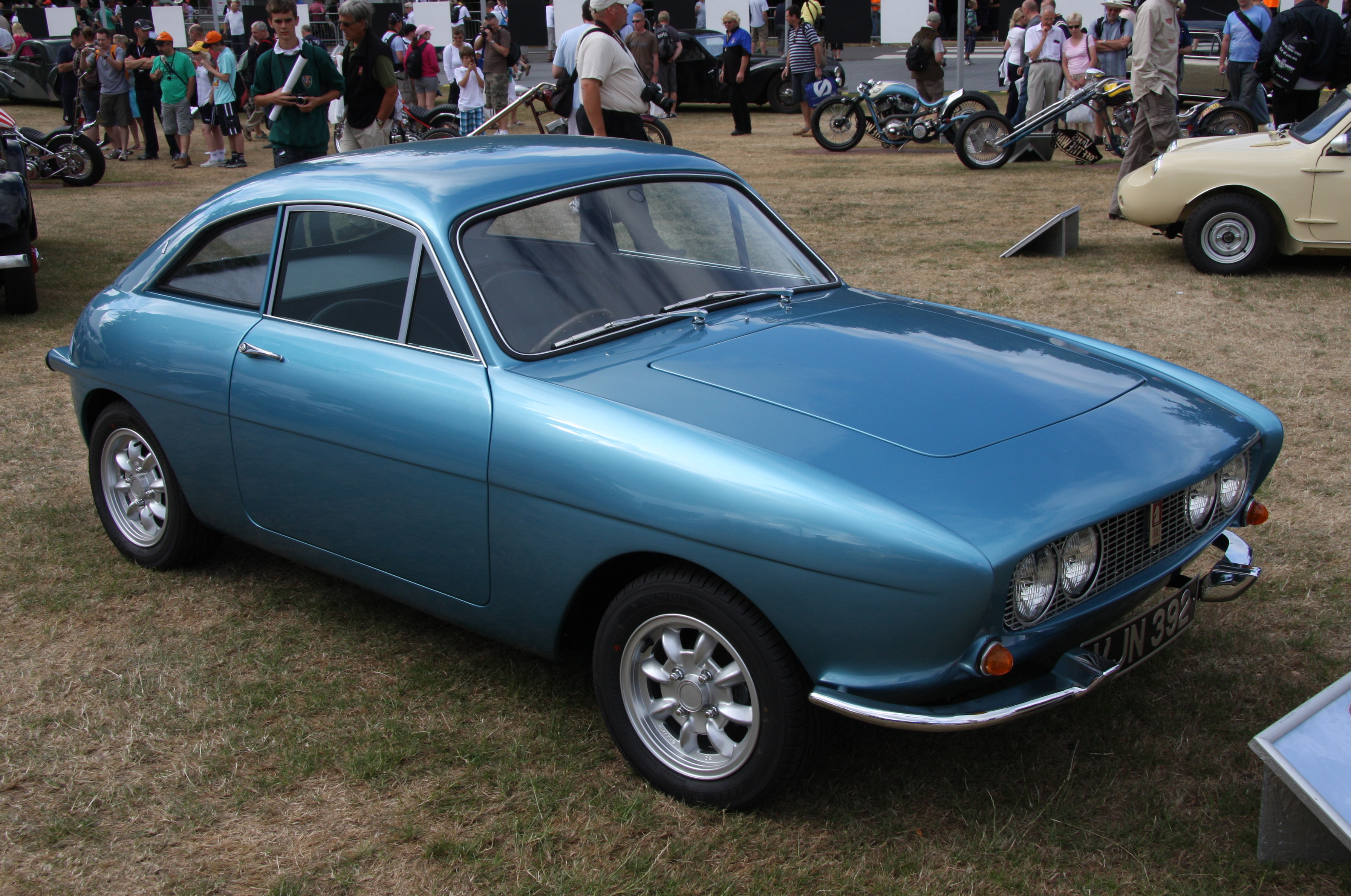 Goodwood 2009